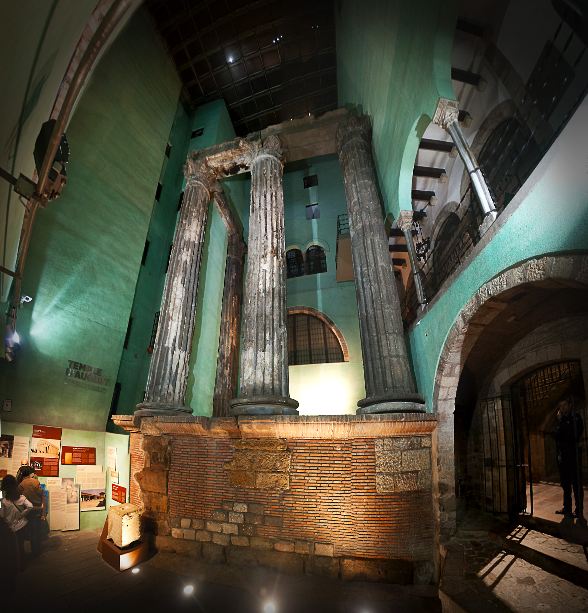 Panorámica de las ruinas del Templo de Cesar Augusto en Barcino